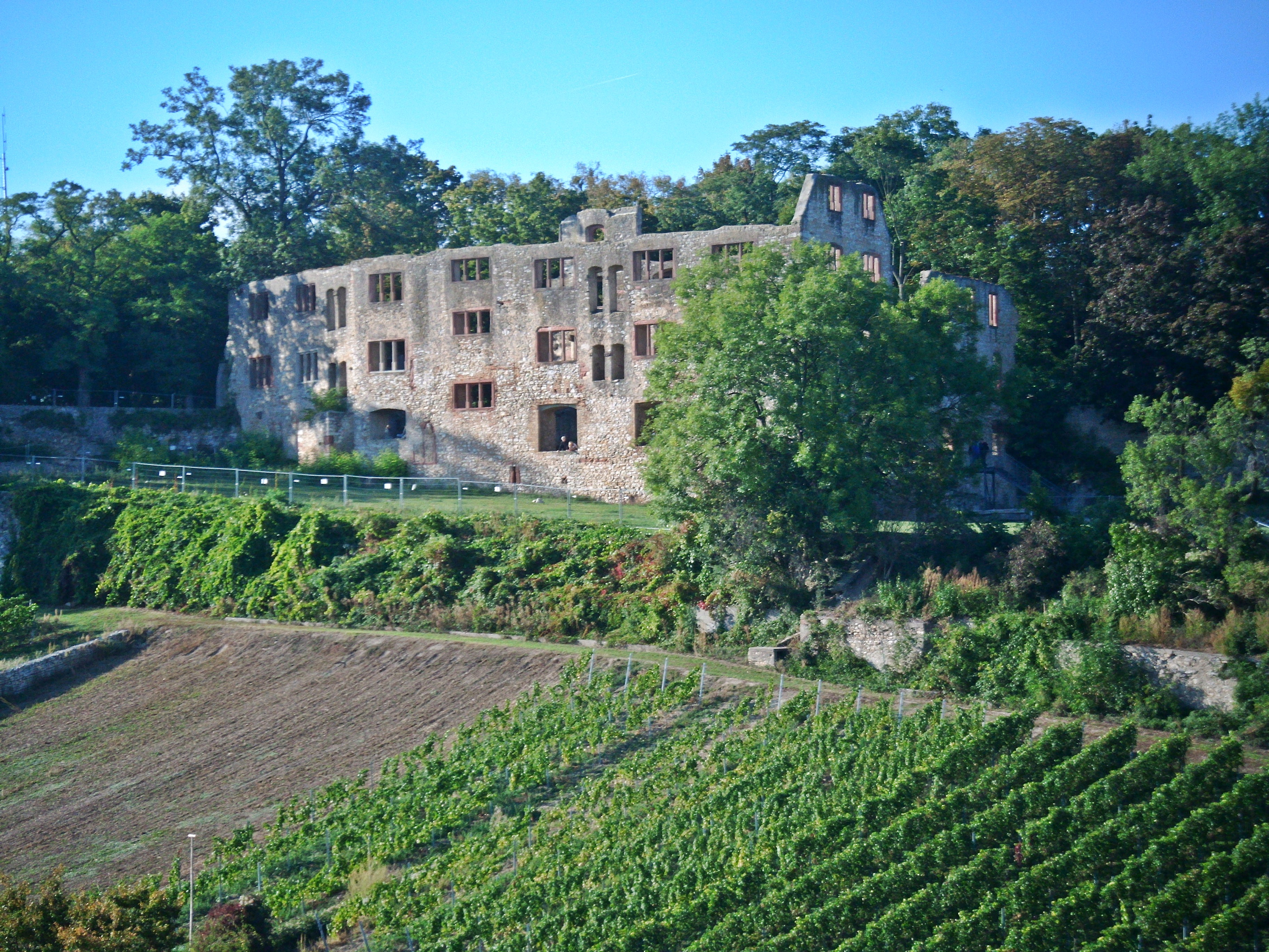 Oppenheim, Burg Landskron, vom Turm der Katharinenkirche aus aufgenommen.